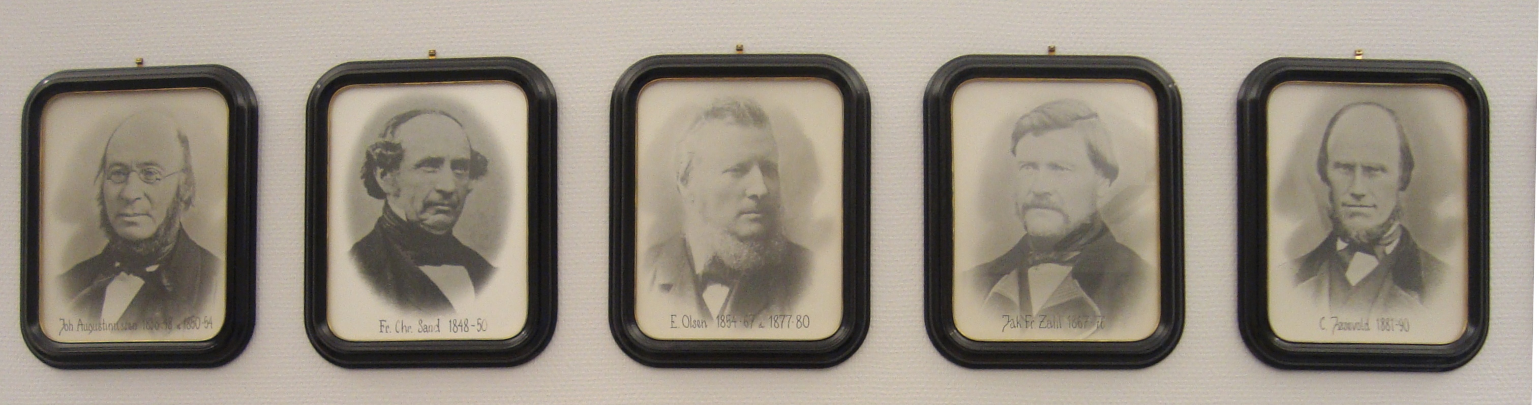 Nesnas fem første ordførere. Fra kommunestyresalen i Nesna